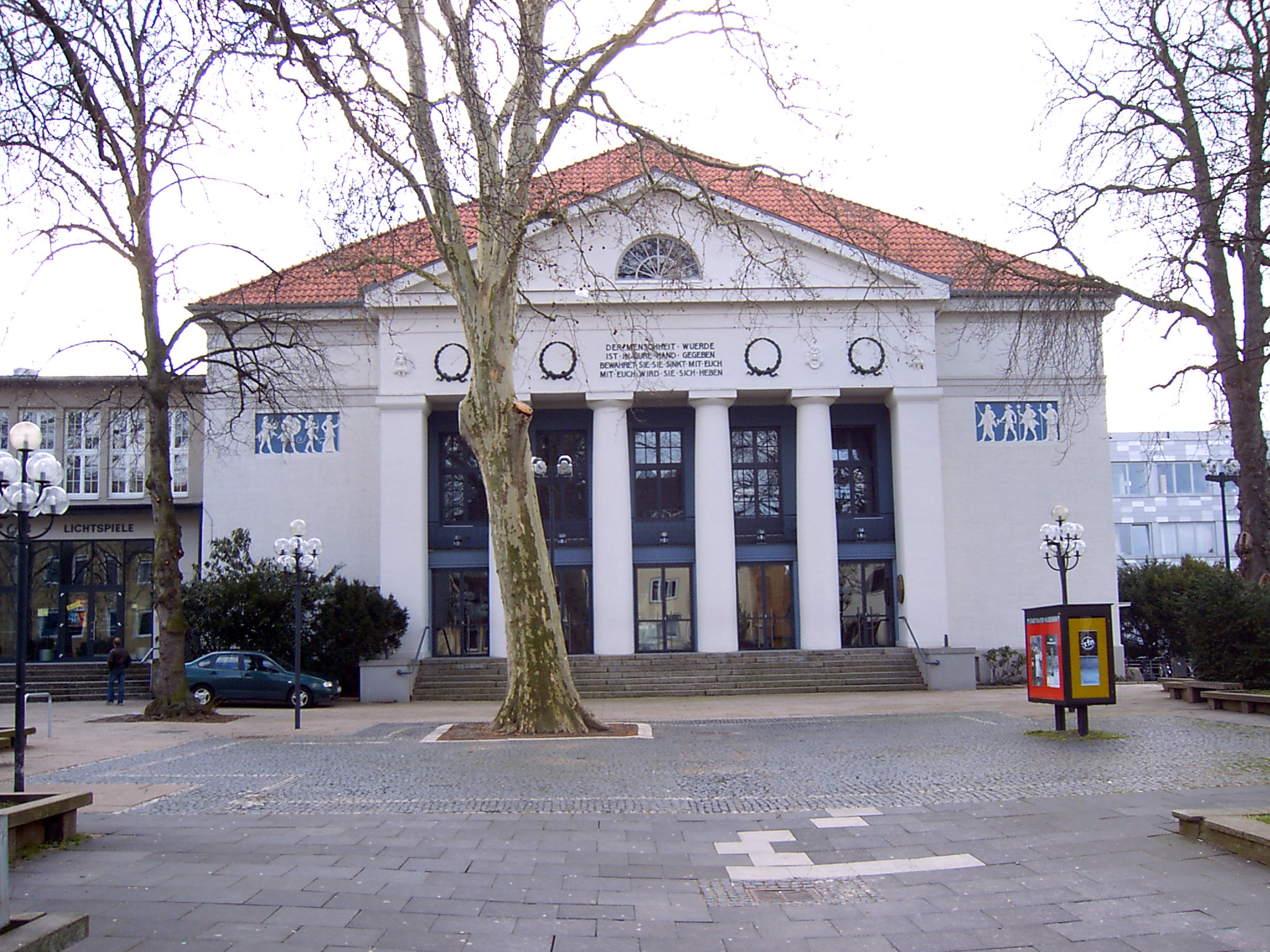 Eingang zum Stadttheater in Hildesheim